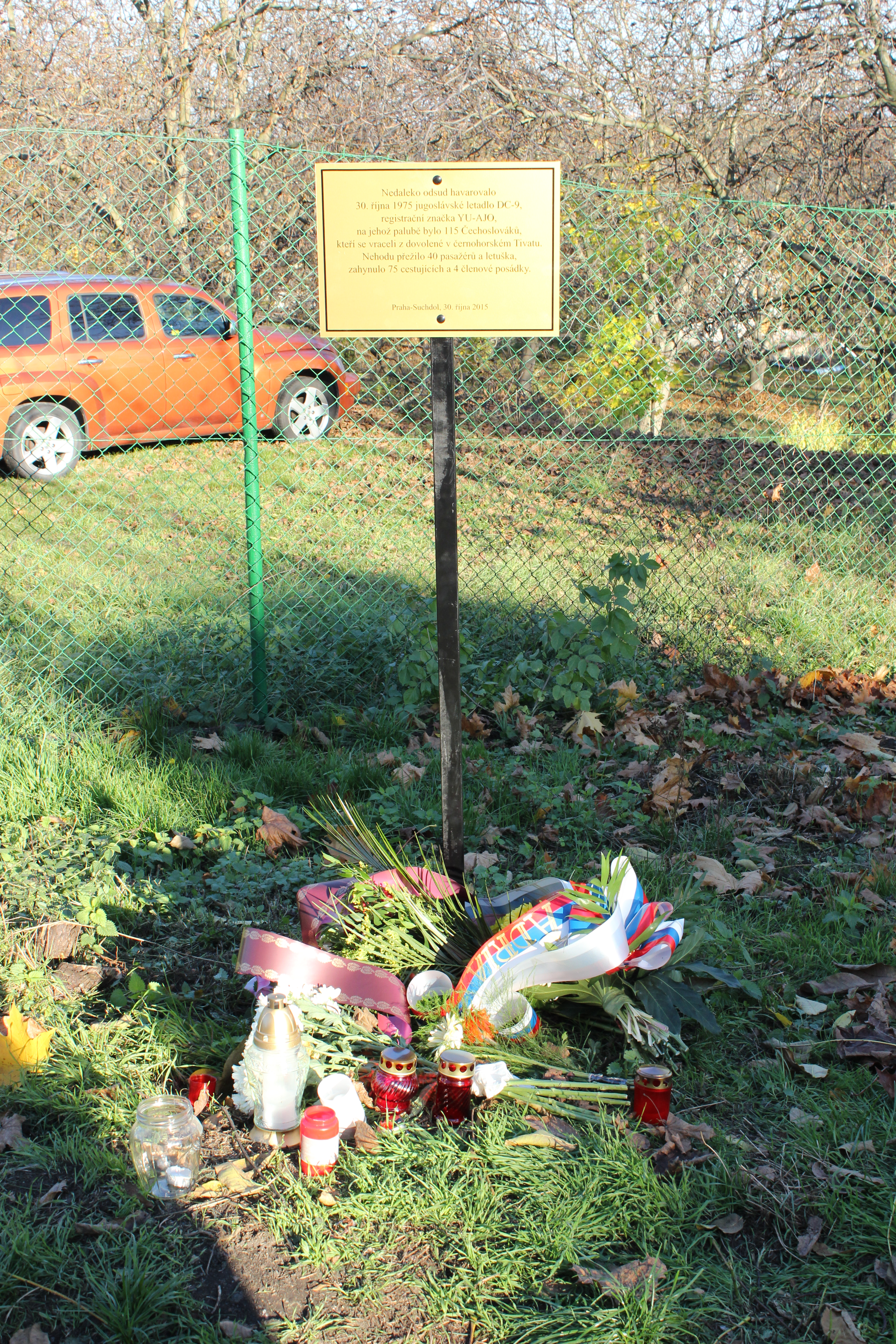 Prozatimní pomník leteckému neštětí z 30. října 1975 v pražském Suchdole. Pomník byl odhalen při čtyřicátém výročí tragédie v roce 2015.